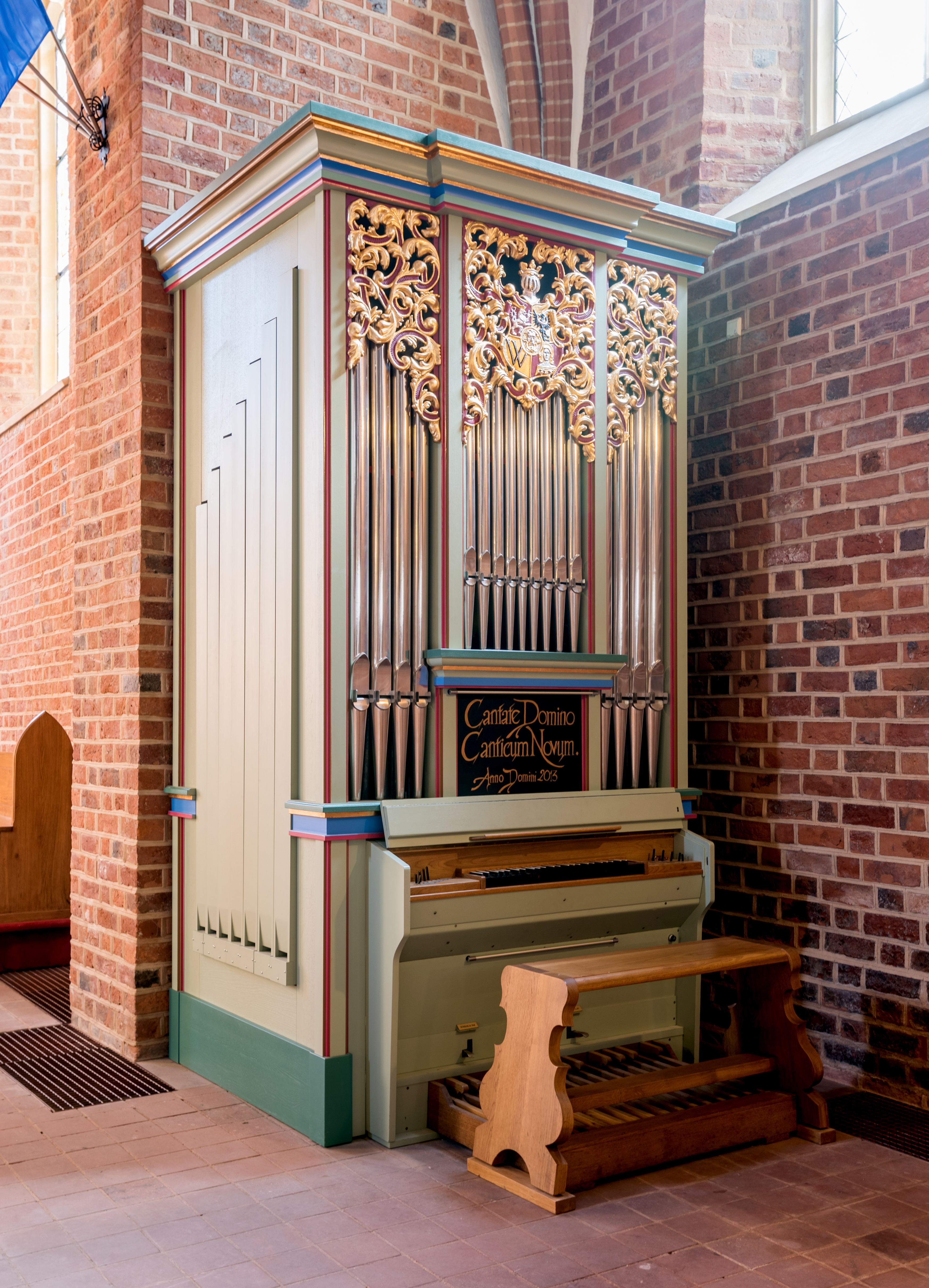 Organy firmy Walcker w kościele Św. Krzysztofa we Wrocławiu